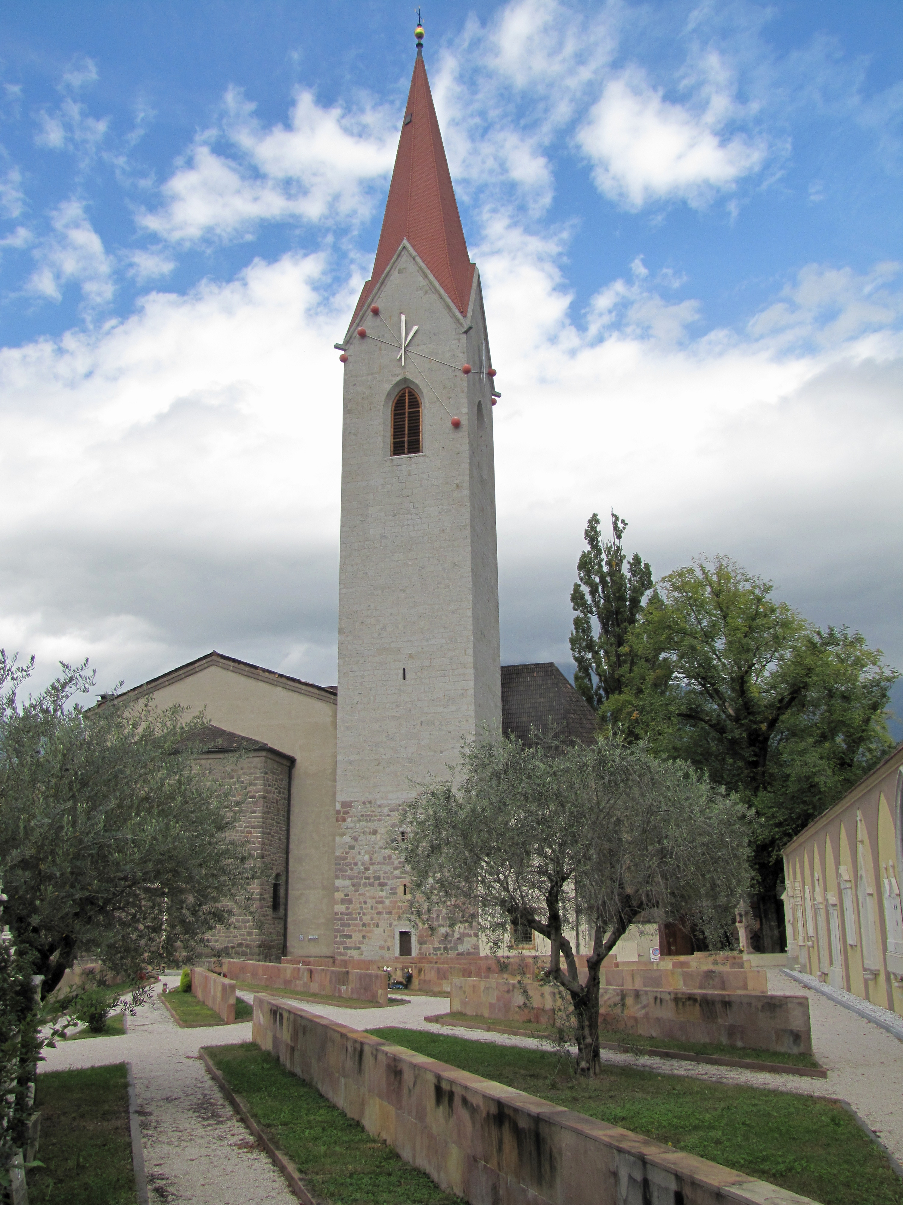 Pfarrkirche St. Vigil in Untermais in Meran